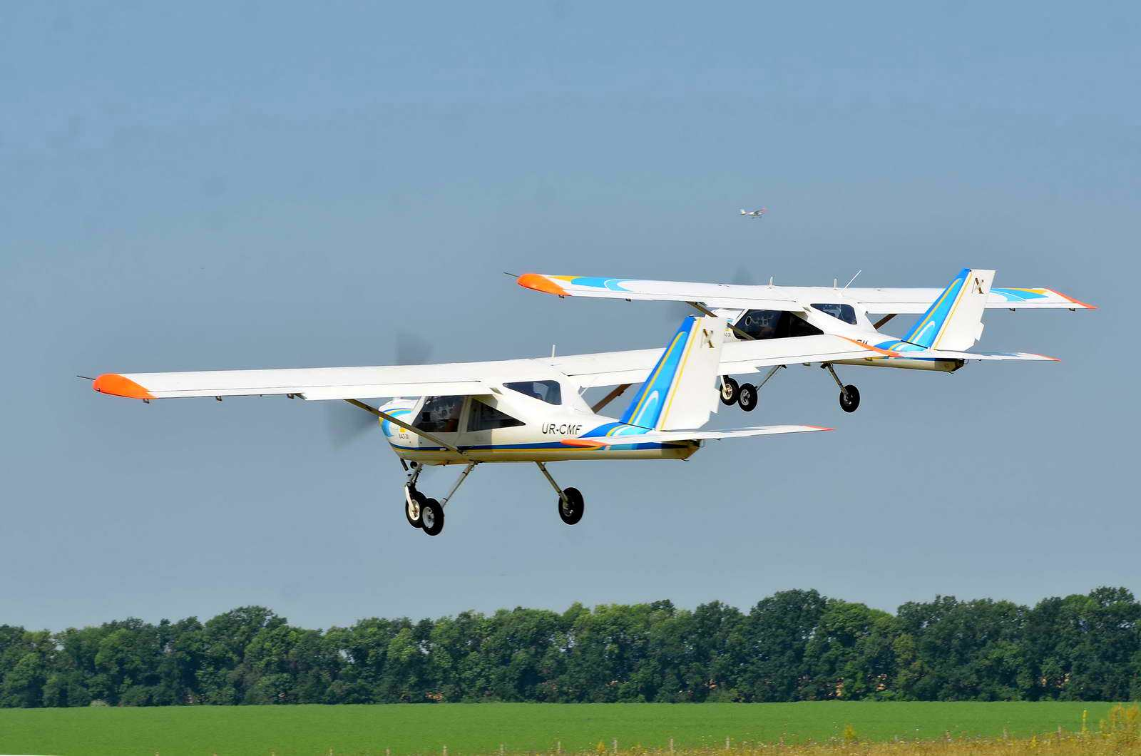 курсанти ІІ-го курсу льотного факультету Харківського національного університету Повітряних Сил імені Івана Кожедуба під час виконання самосійних польотів на легкомоторних літаках типу ХАЗ-30 Фото: Олег Плаксій